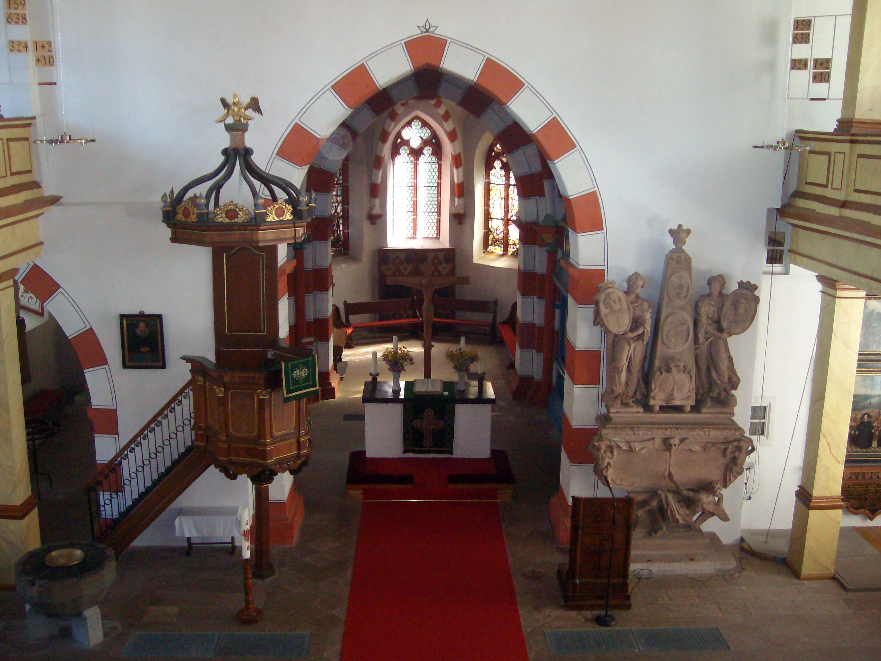 Innenraum mit Blick auf den Chor der Evang. Stadtkirche in Laubach, Hessen